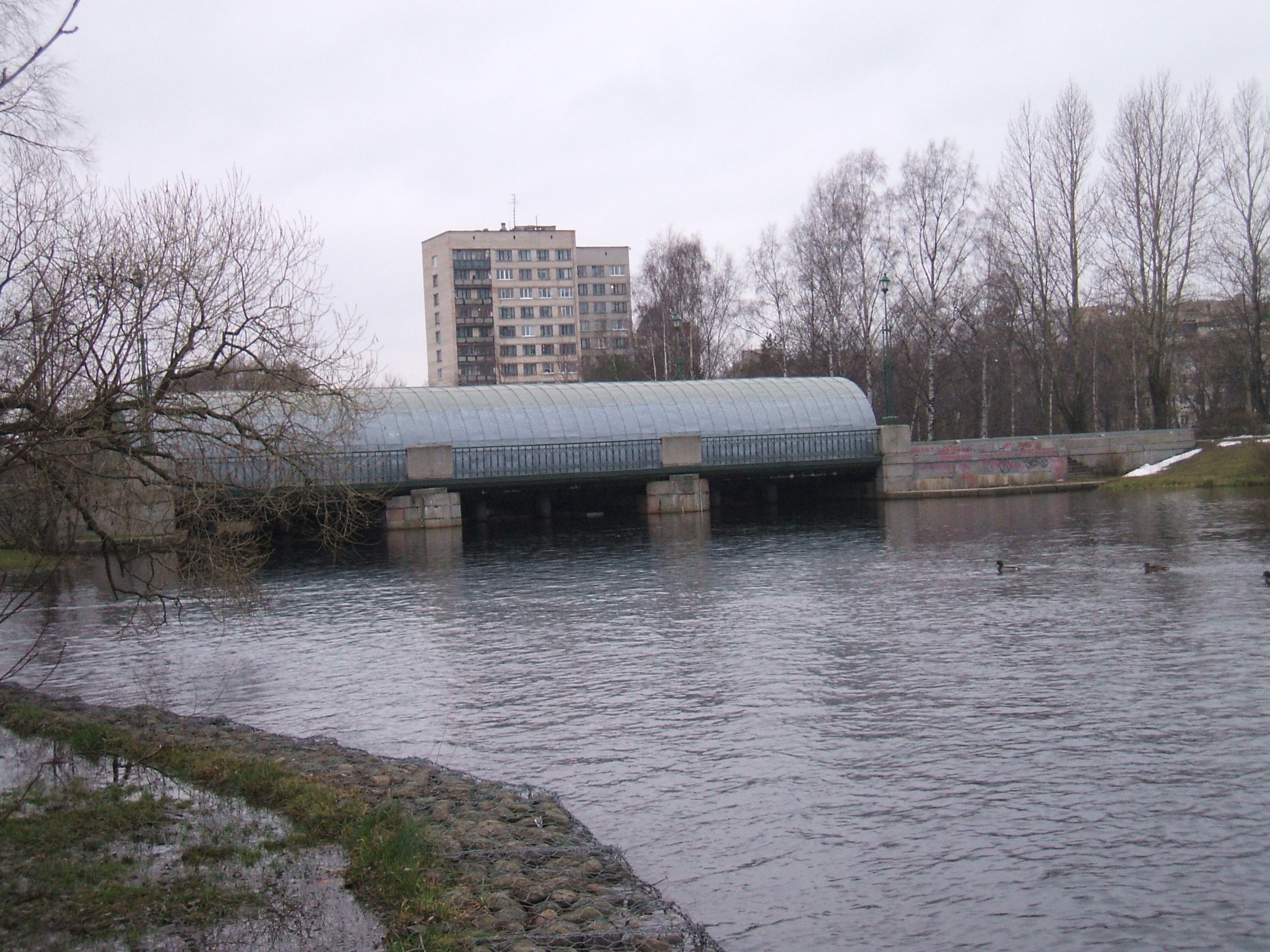 верхний подпорный уровень плотины Гаусмана